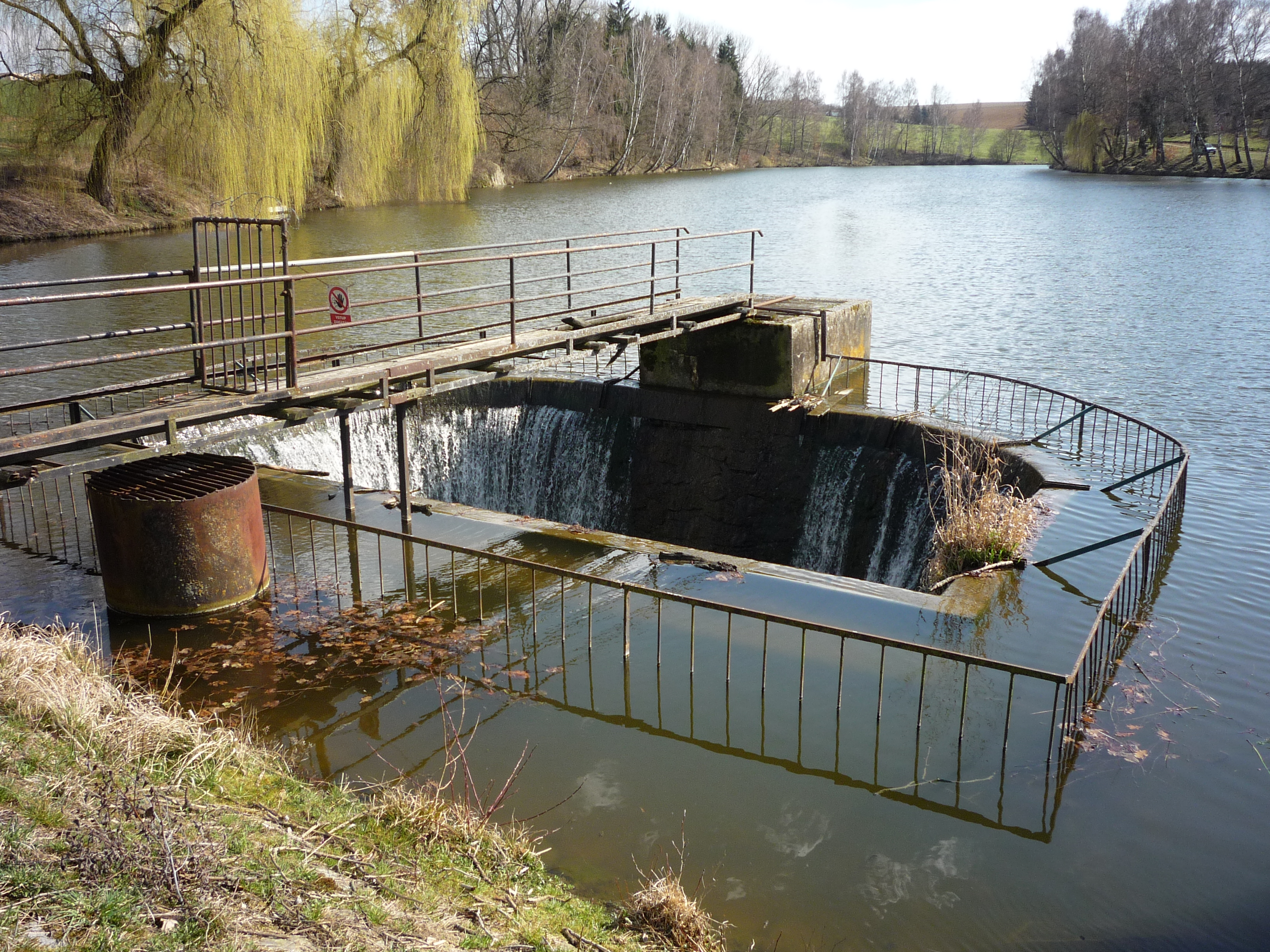 Autor fotografie Jiří Zelenka. Toulky Vysočinou. Potok Žabinec a malá vodní nádrž Žabinec. Havlíčkův Brod.